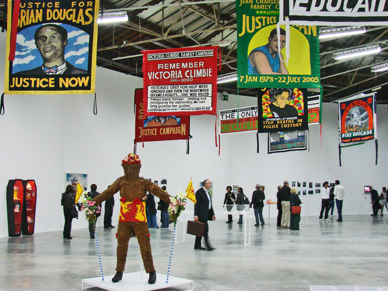 A l'occasion de sa carte blanche au Palais de Tokyo, Jeremy Deller propose une exposition intitulée "D'une révolution à l'autre", de la révolution industrielle en Angleterre à l'industrie du spectacle, en passant par le folklore et les traditions populaires britanniques.